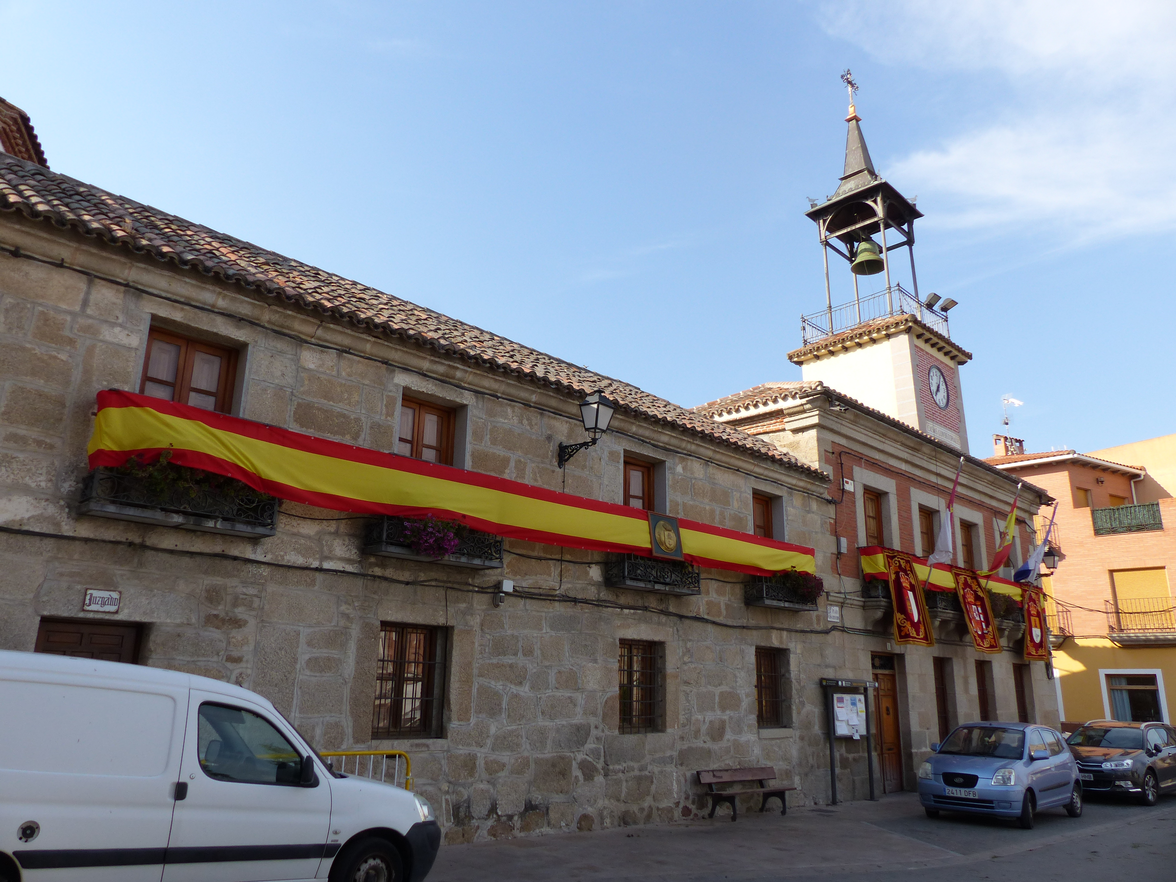 Mejorada, Toledo, España